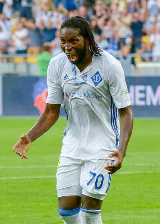 Мбокані - конголезький футболіст "Динамо" (Київ)